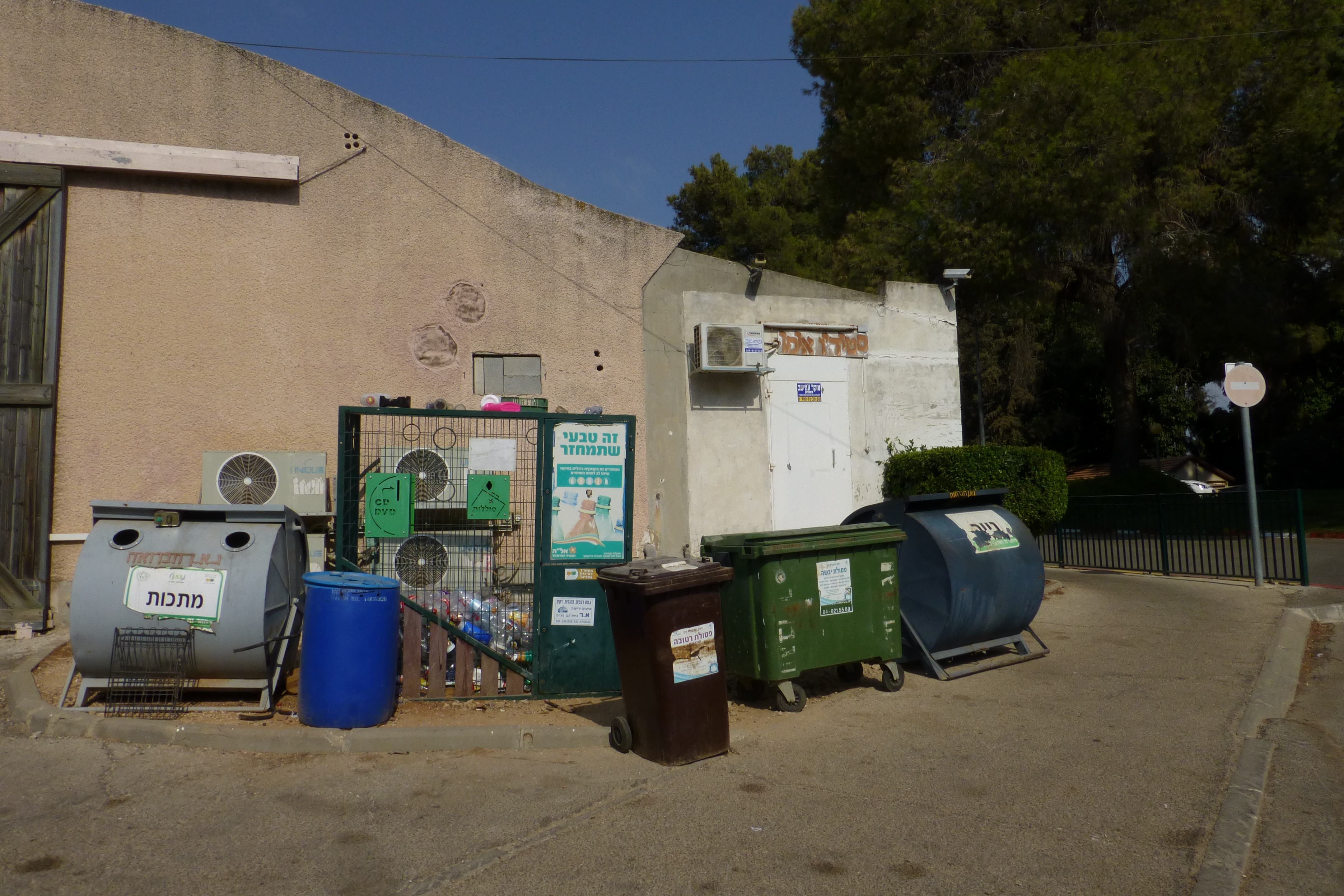 מוזיאון אוצרות